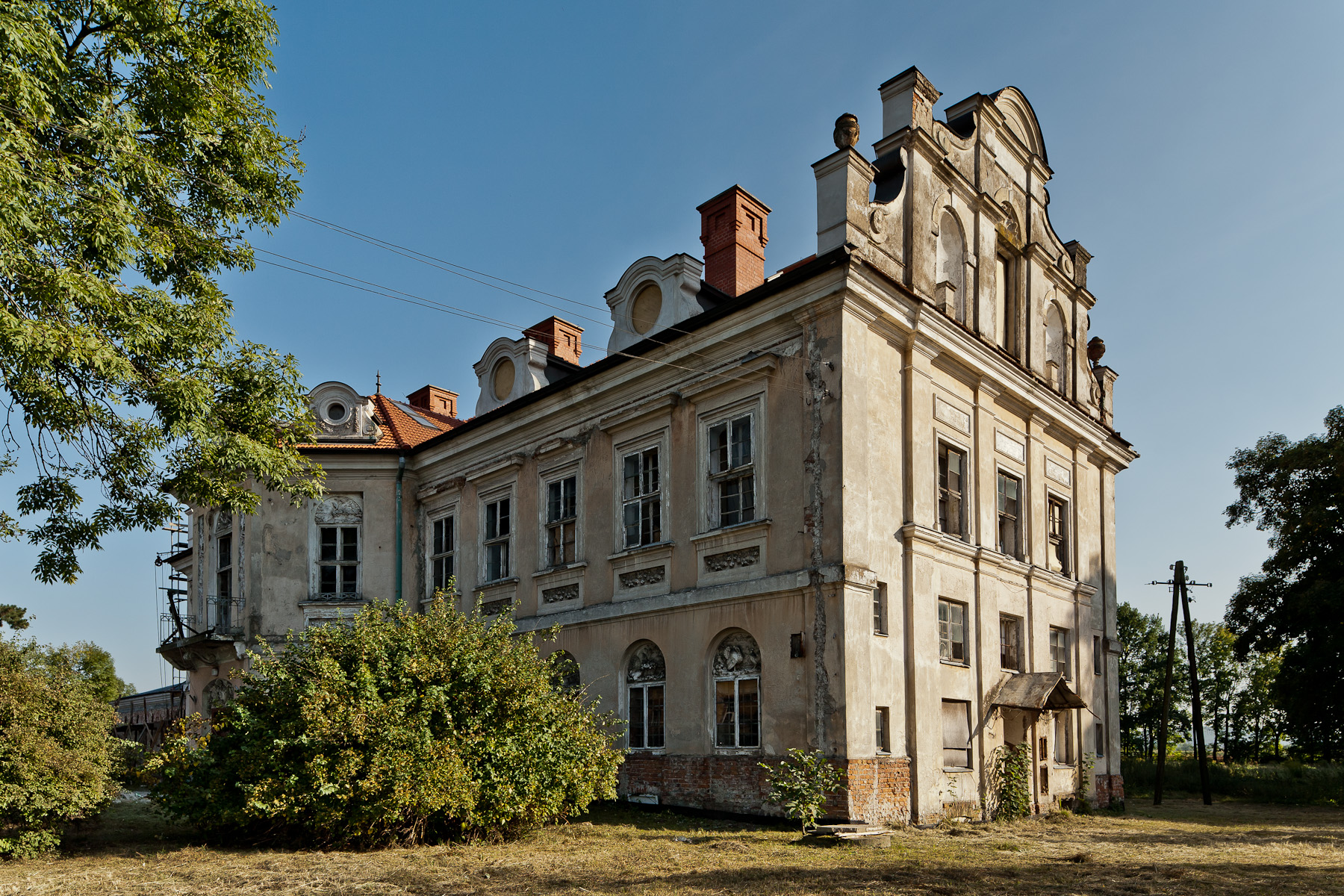 Zespół pałacowy, Kryspinów - widok ogólny